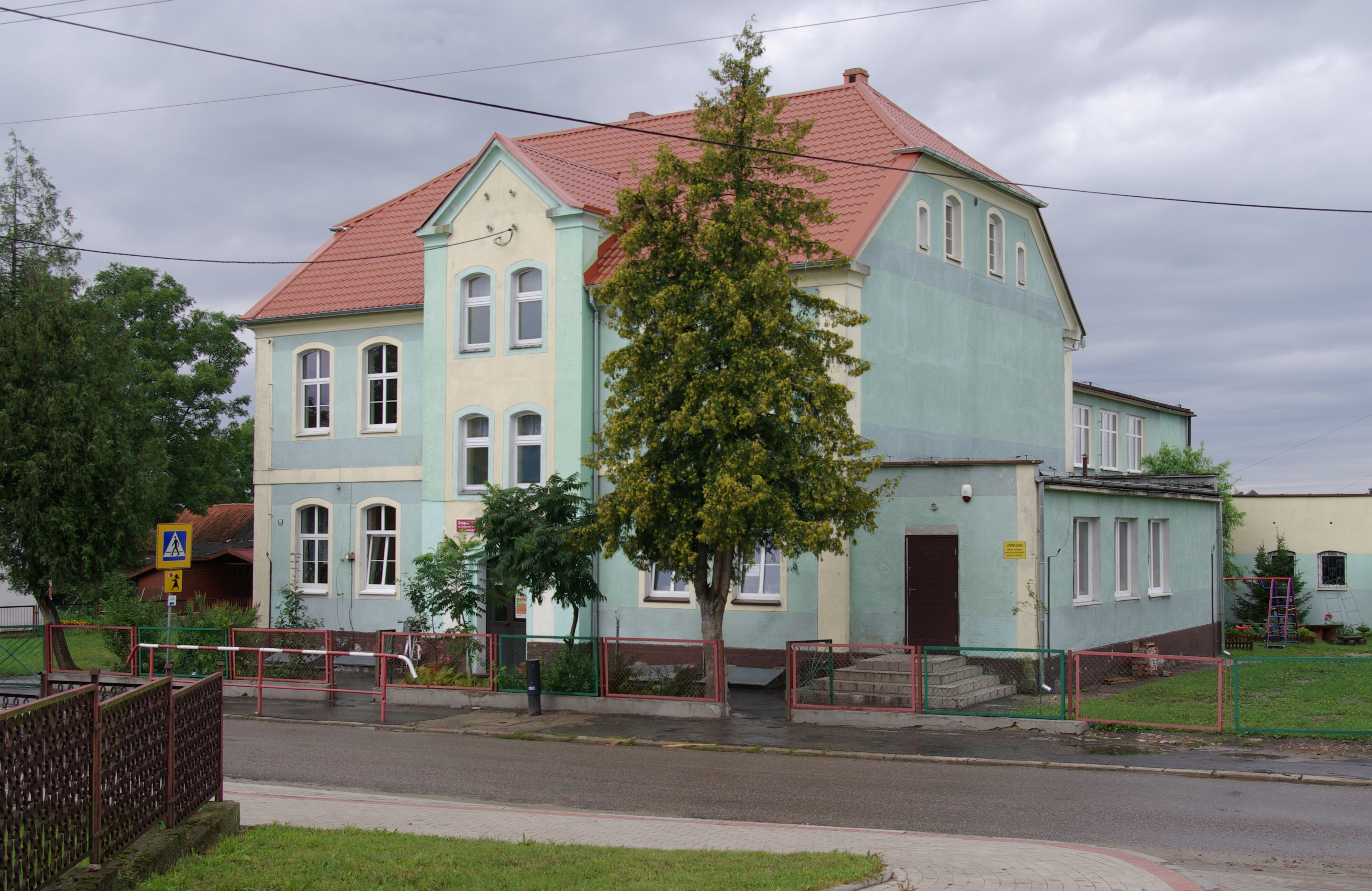 Radzieje